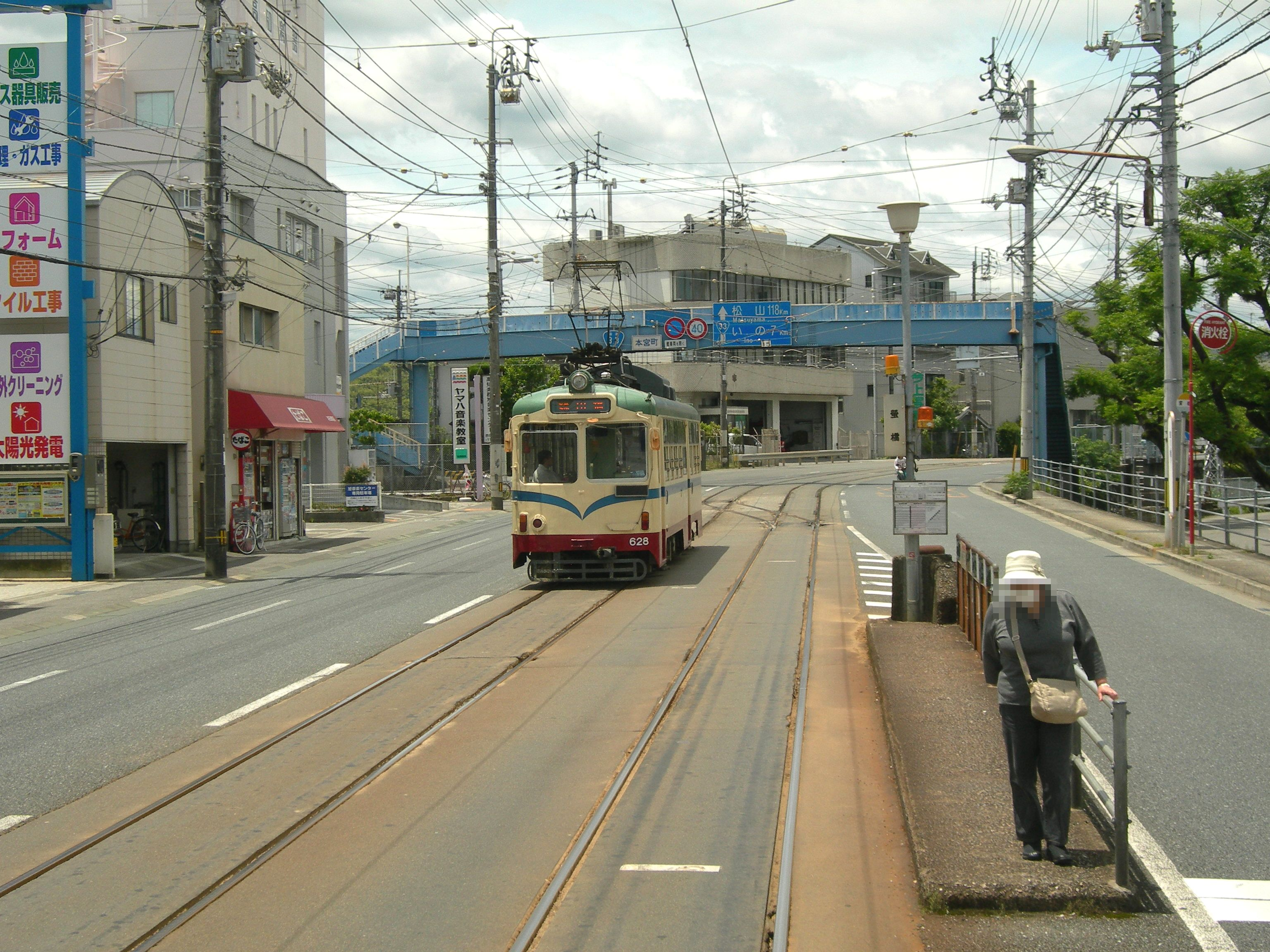 土佐電気鉄道蛍橋電停。